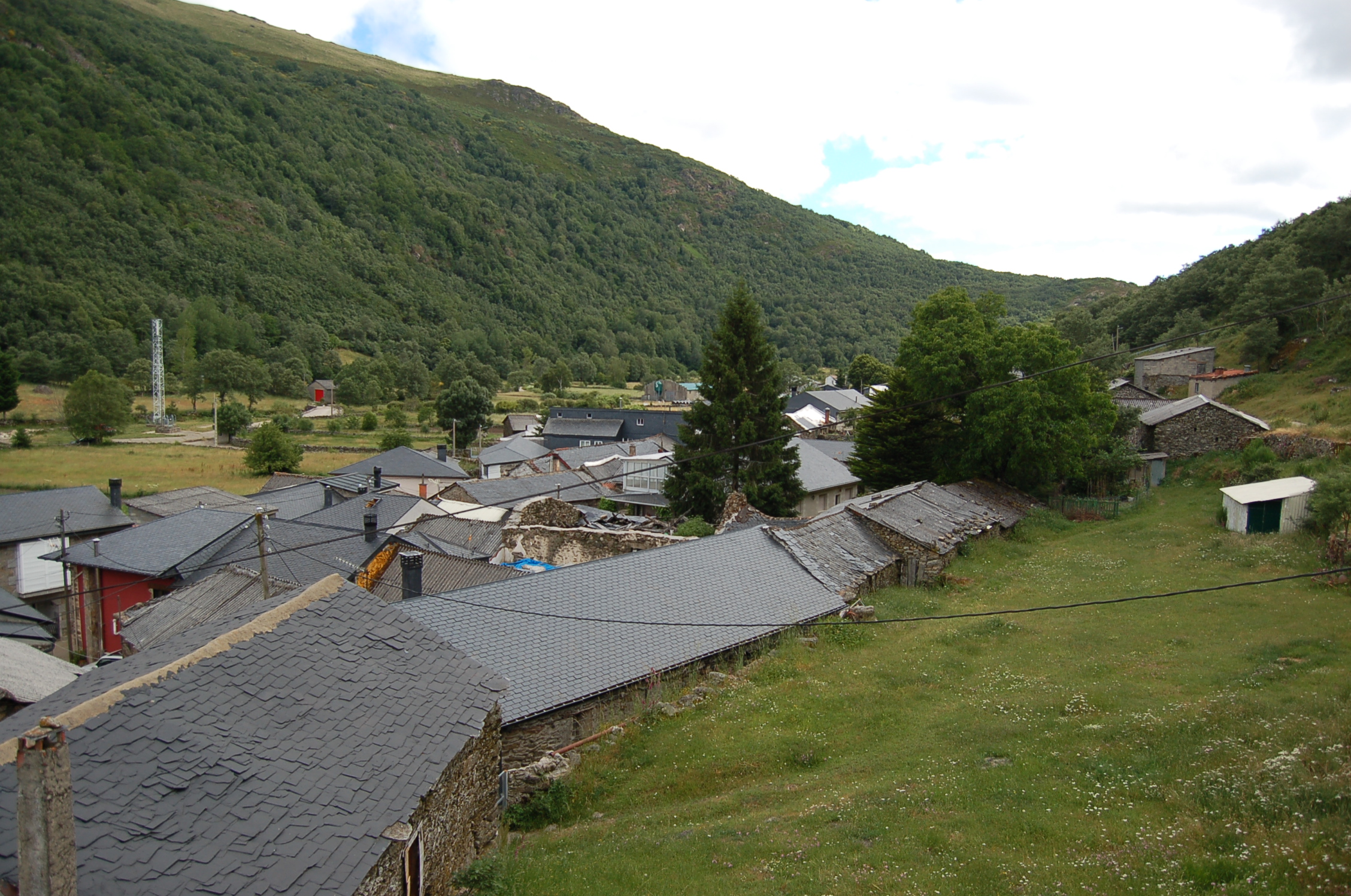 Vista desde a igrexa de Barxacova, As Pías